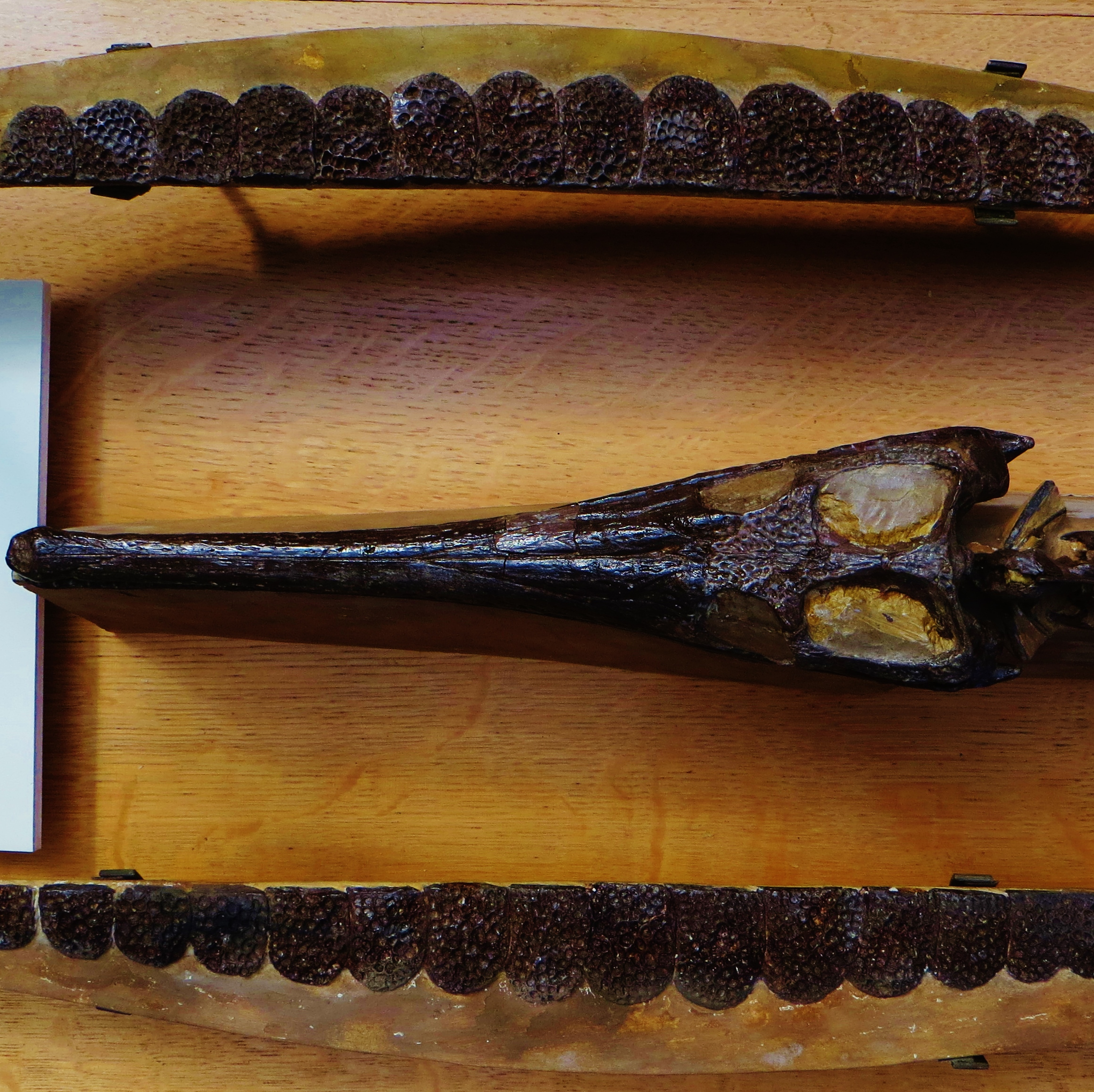 Fossil of Pelagosaurus, an extinct reptile- Took the photo at Musee d'Histoire Naturelle, Paris